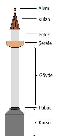 Minarenin yapısı ve bölümleri